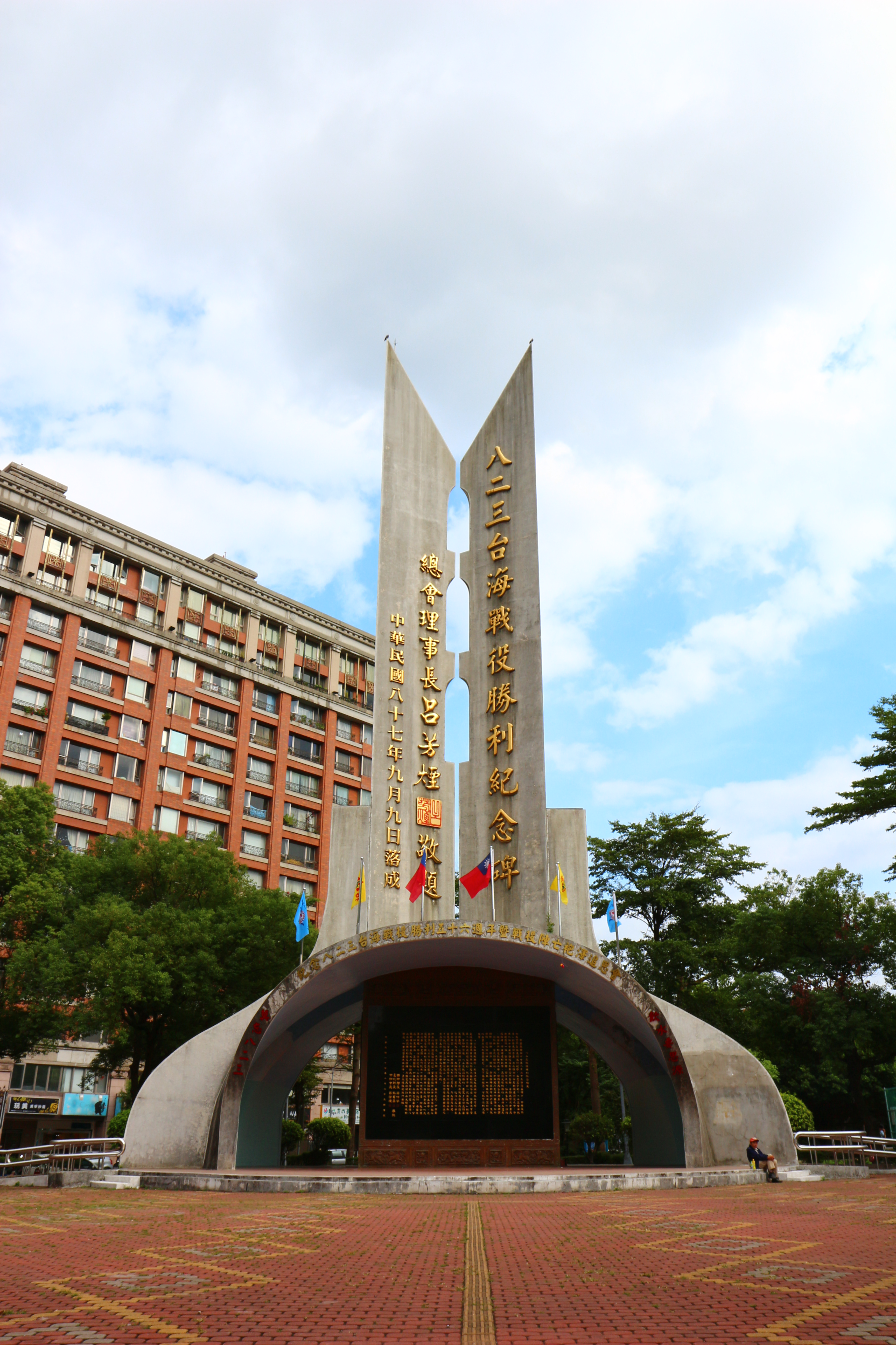 位於臺灣新北市中和區八二三紀念公園的八二三台海戰役勝利紀念碑。